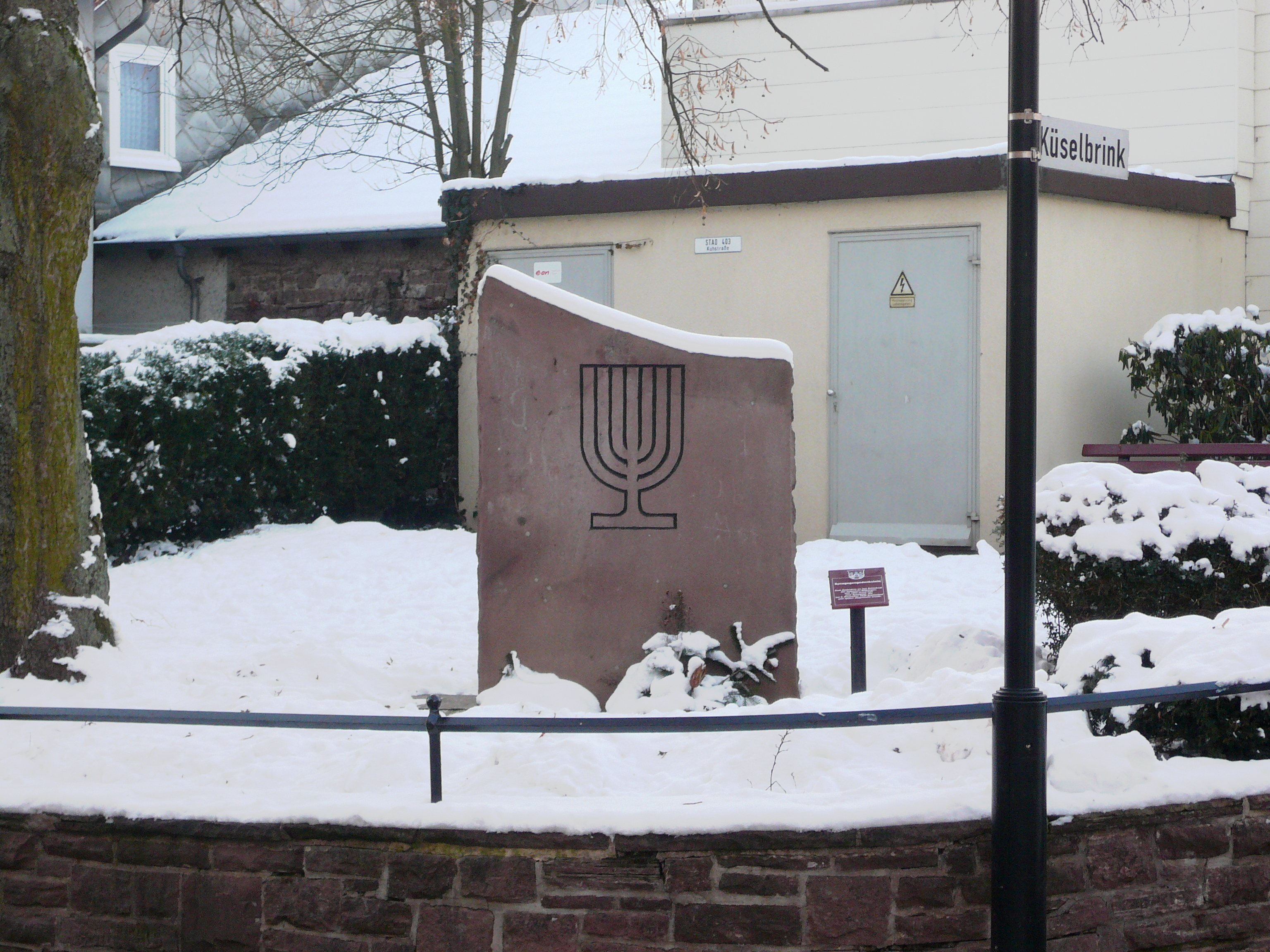 Gedenkstein für die in der Pogromnacht zerstörte Synagoge der jüdischen Gemeinde Stadtoldendorf, Landkreis Holzminden, Niedersachsen. Auf dem Schild steht: "Synagogengedenkstein Zum Gedenken an das Schicksal der jüdischen Mitbürger; seit 1855 stand hier eine Synagoge, die am 9. November 1938 geplündert und später abgerissen wurde."